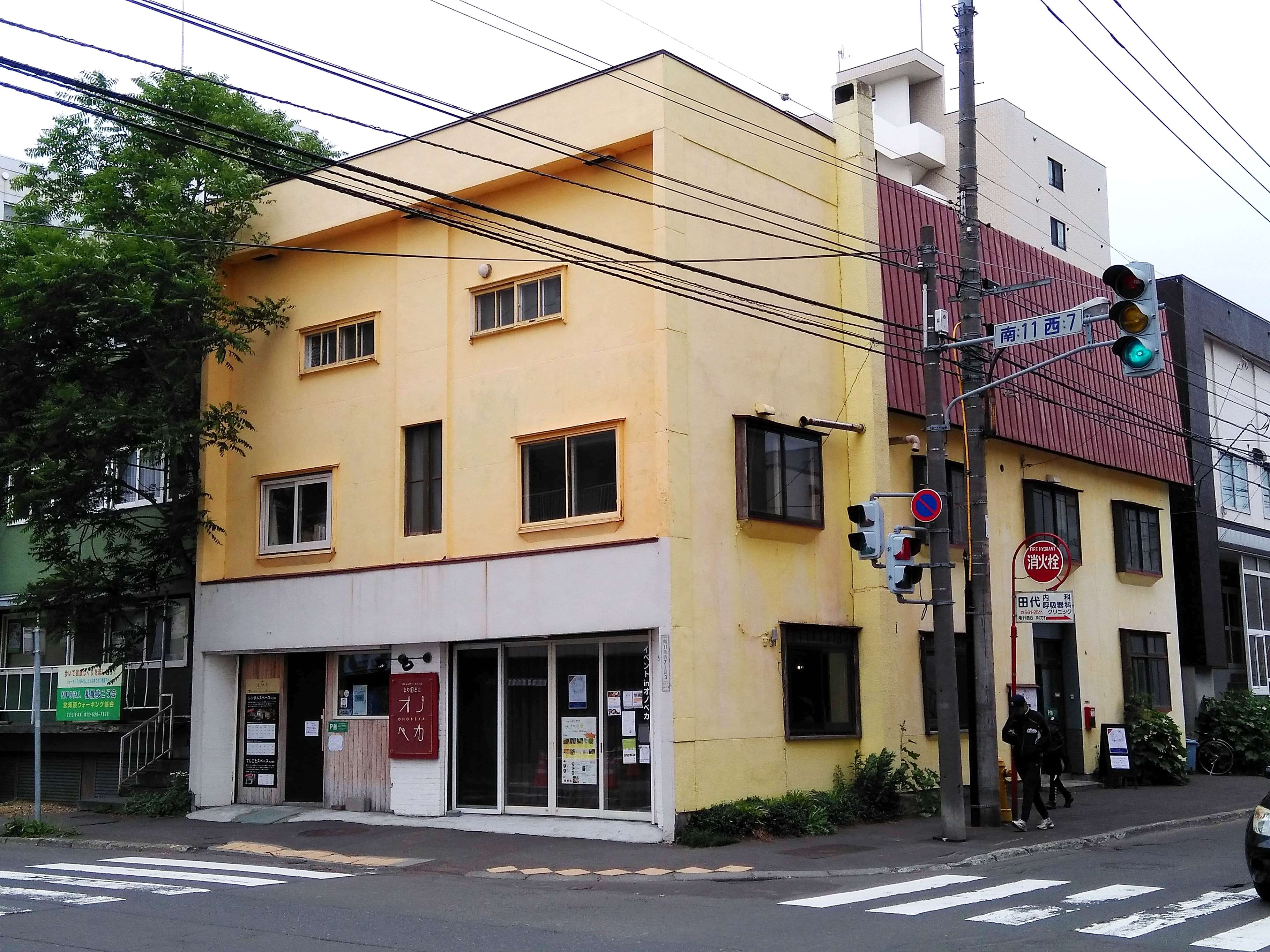 よりどこオノベカ。黄色い建物で、向かいにローソンがある。